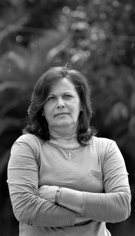 Ania Toledo Hernández